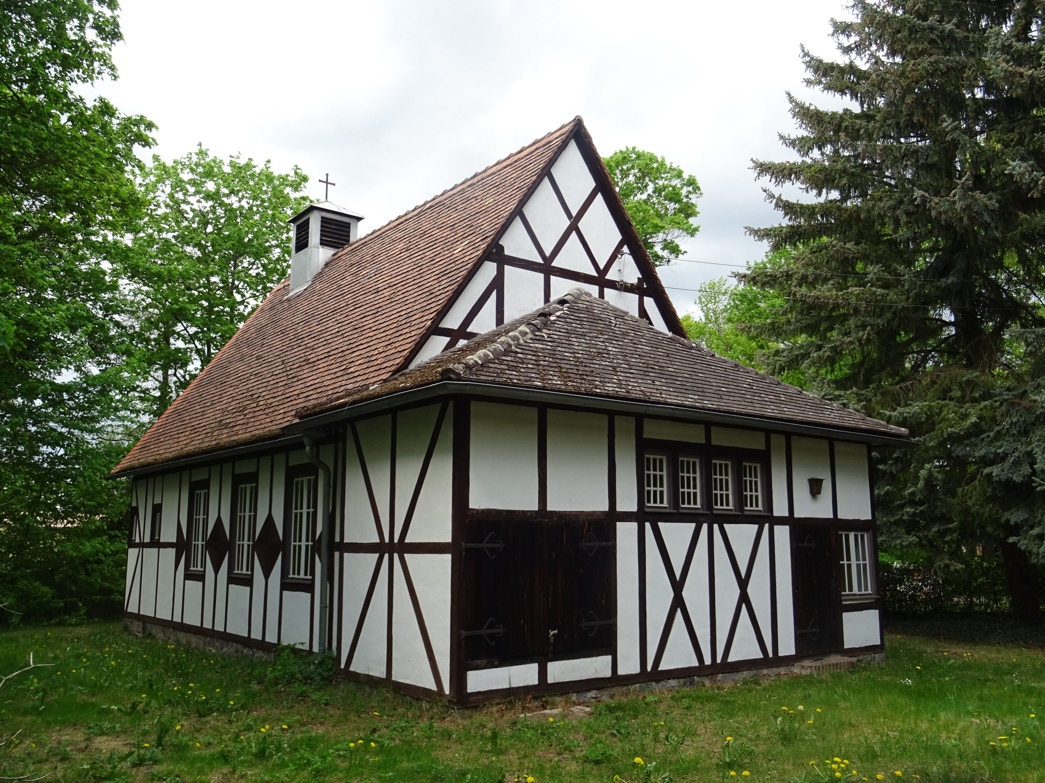 Bollensdorf, denkmalgeschützte Dorfkirche, 1952 erbaut, Blick von Südosten